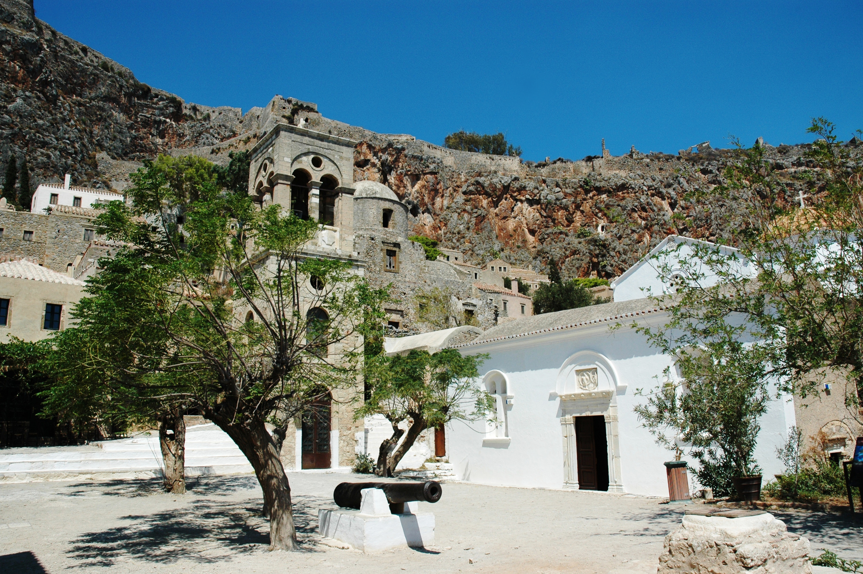 Αρχαιολογικός Χώρος Κάστρου Μονεμβασίας«Αρχαιολογικός Χώρος Κάστρου Μονεμβασίας»